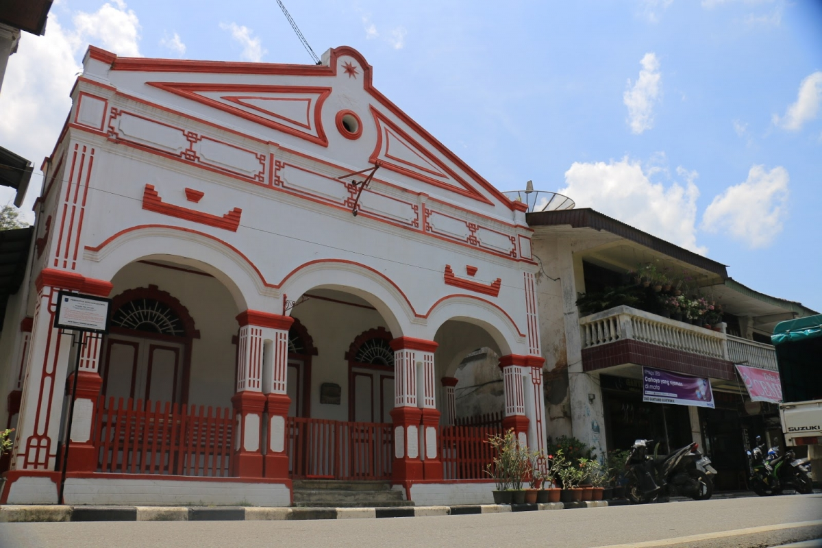 Rumah Pek Sing Kek